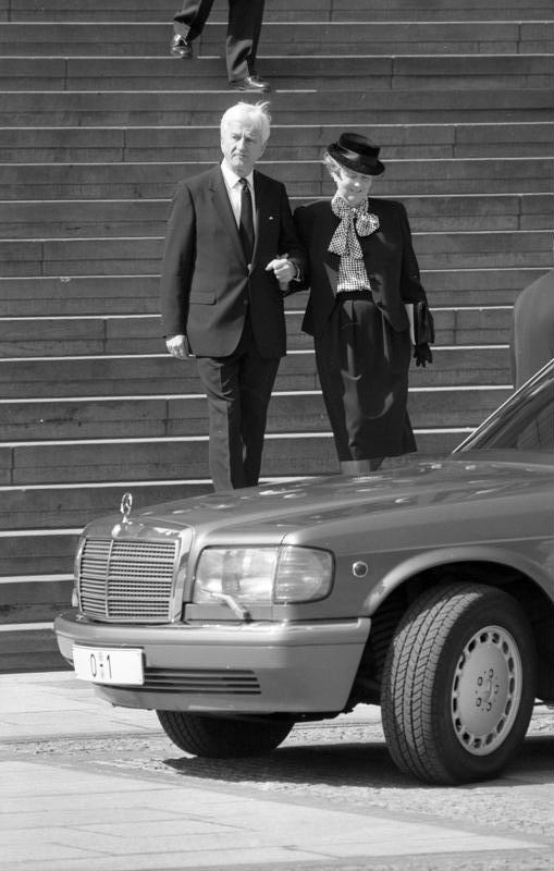 Berlin, 10.4.1991 Im Schauspielhaus in Berlin fand für den am 1.4.1991 von Terroristen ermordeten Präsidenten der Treuhandanstalt, Dr. Detlev Carsten Rohwedder, ein Staatsakt statt. In ihren Ansprachen würdigten Bundespräsident Dr. Richard von Weizsäcker, der Ministerpräsident des Landes Nordrhein-Westfalen, Johannes Rau und der Vorsitzende des Verwaltungsrates der Treuhandanstalt, Jens Odewald, die Verdienste des Verstorbenen.